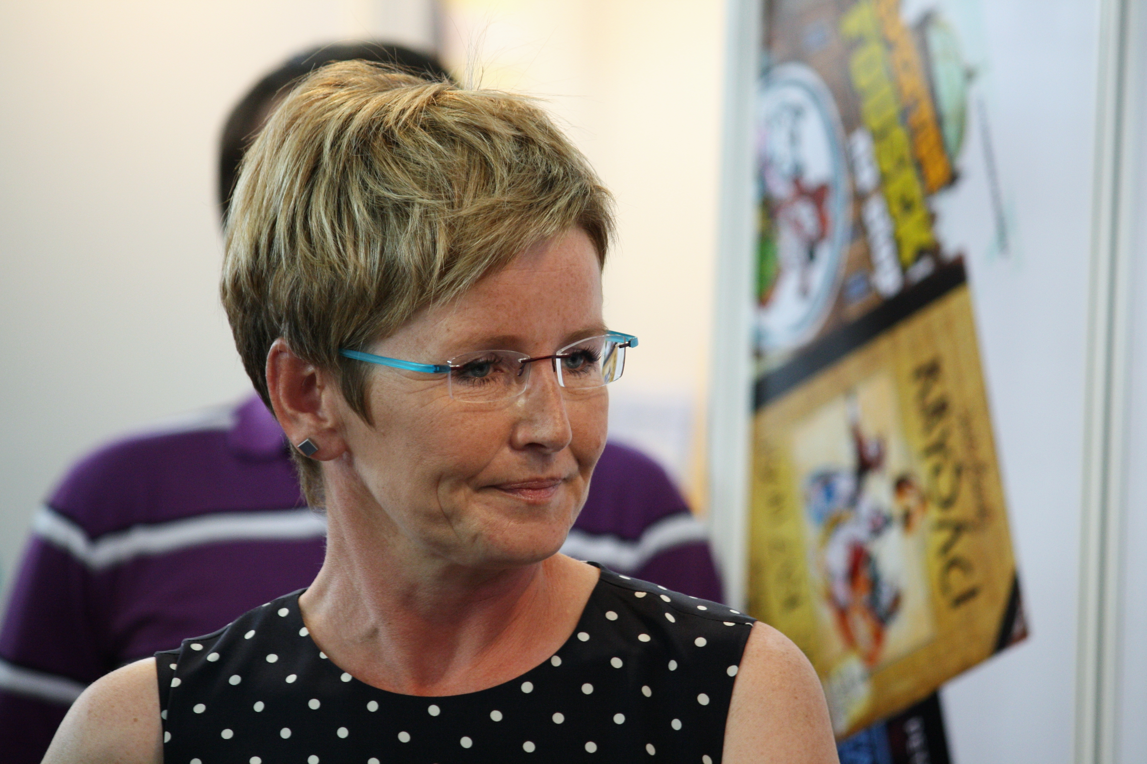 Svět knihy 2013¨- Marcela Augustová Personality rights warning Although this work is freely licensed or in the public domain, the person(s) shown may have rights that legally restrict certain re-uses unless those depicted consent to such uses. In these cases, a model release or other evidence of consent could protect you from infringement claims.